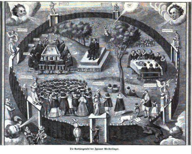 Schul- oder Anschlagtafel der Iglauer Meistersinger (Iglauer Postenbrief), Öl auf Holz, 1612. Mitte: Meistersinger auf Singstuhl, über ihm: Kranz mit Schaumünze. Oben links: Die zwölf alten Meister. Rechts: Die neun Iglauer Meister um die Bibel und einen Preispfennig. Allegorische Darstellungen der 7 Freien Künste. König David als Sänger. Heiliger Geist als Taube.